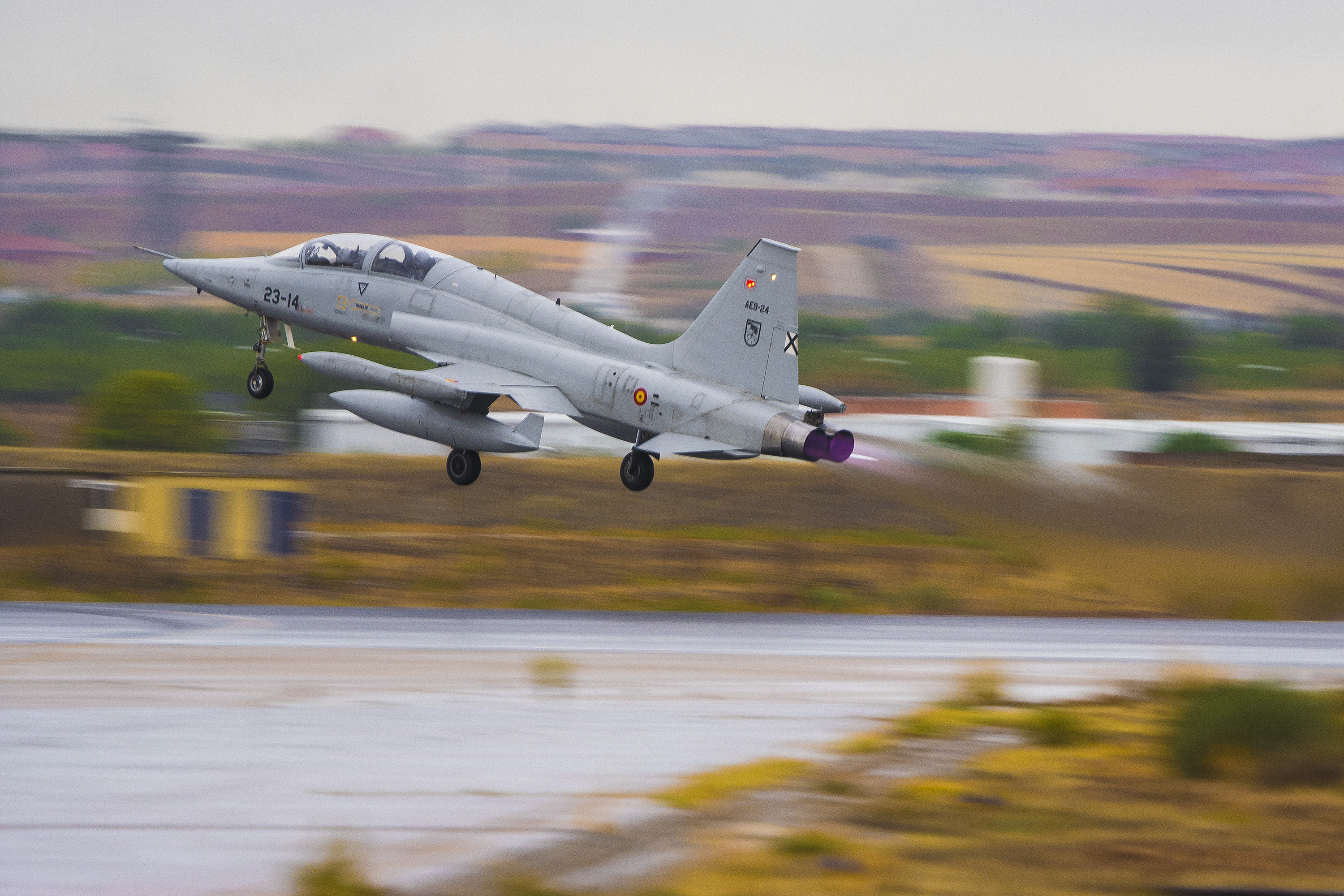 Aire75 Airshow 75 aniversario del Ejercito del Aire